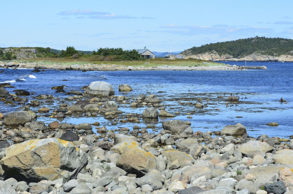 Fugløyrogn sett fra Mølen.